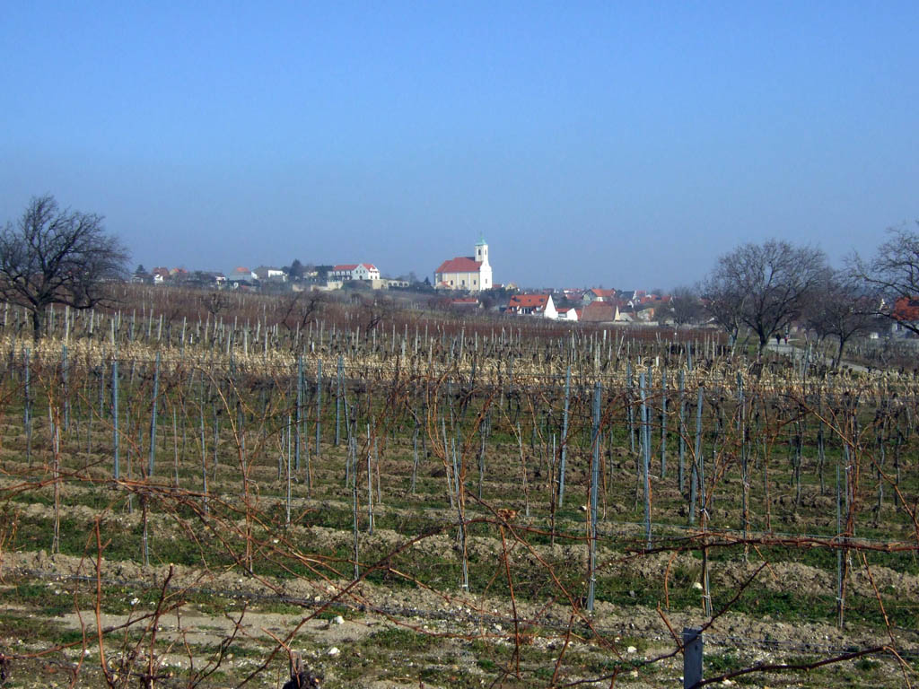 Jois